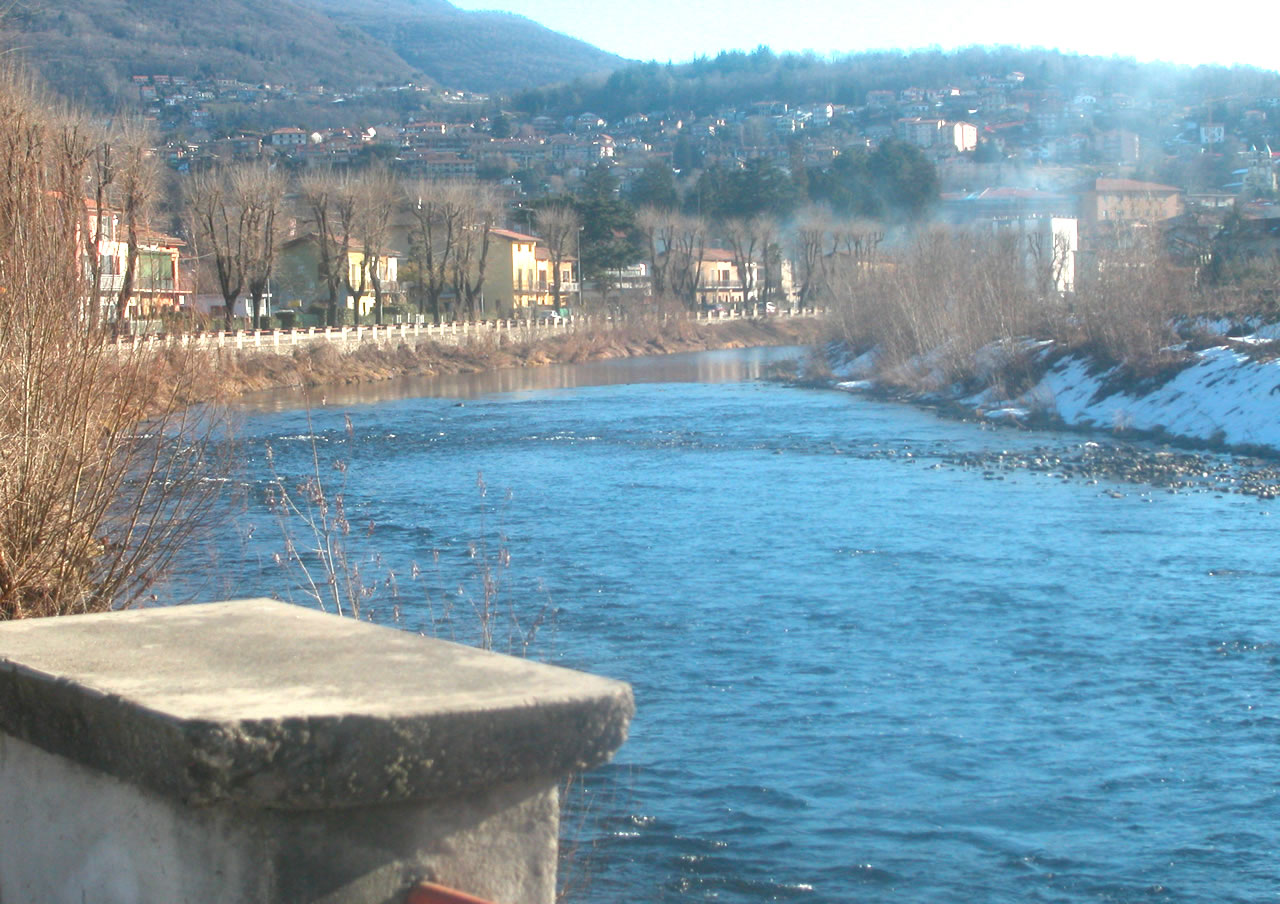 Fiume Tresa a Luino